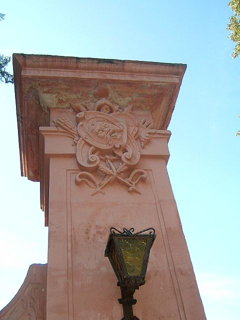 Das Schloss Naumburg befindet sich bei Erbstadt, einem Stadtteil Nidderaus und steht somit am nordöstlichen Rand des Rhein-Main-Gebiets im Main-Kinzig-Kreis, Hessen. Säule am Eingang. Schloss Naumburg